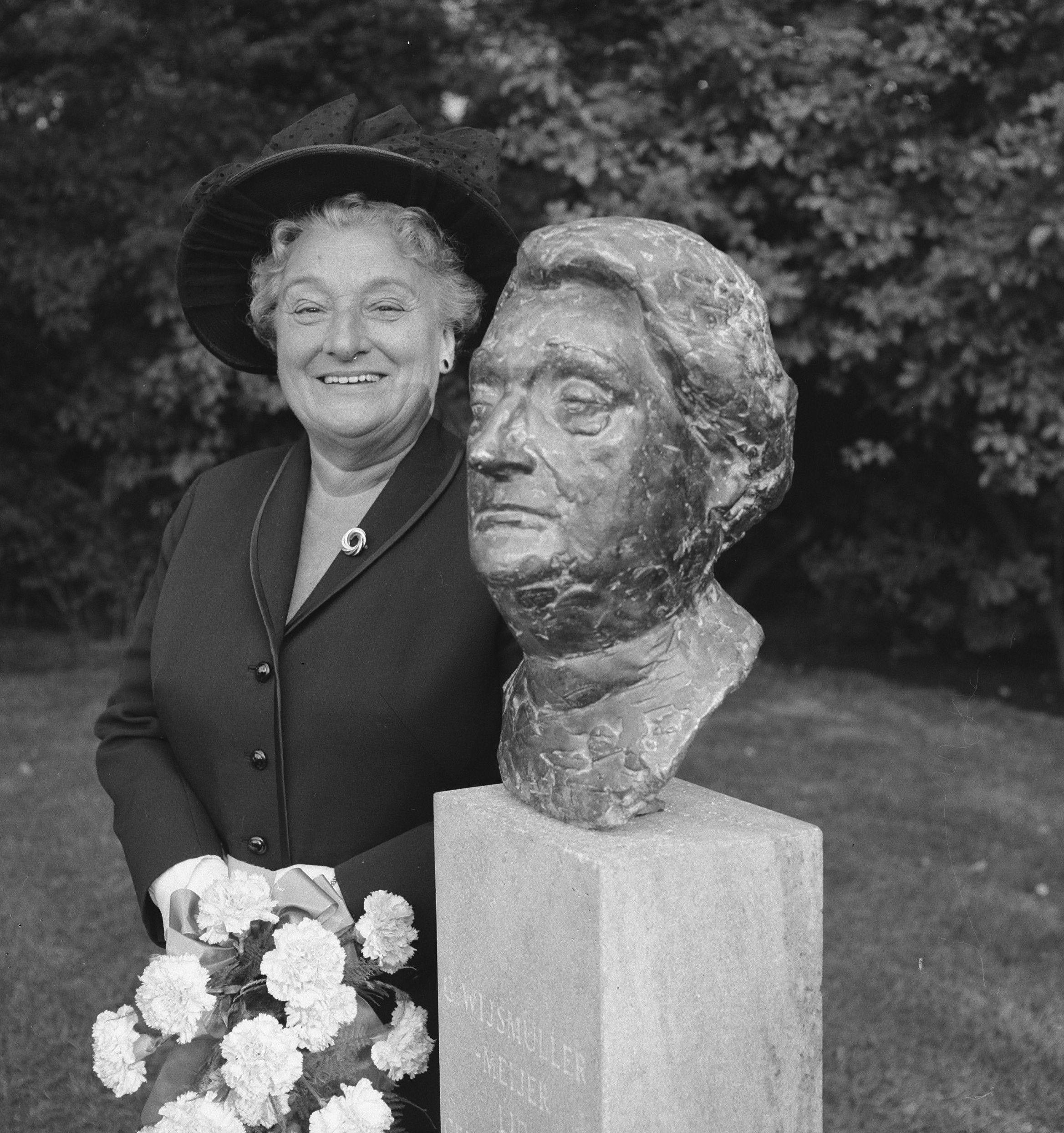 Onthulling portretbuste van mevrouw Wijsmuller in Prinses Beatrixoord in het Oosterpark te Amsterdam, 1965. Mevrouw Wijsmuller naast het beeld. Toen het Beatrixoord werd opgeheven nam ze het beeld mee naar huis. Na haar dood in 1978 is het herplaatst op het Bachplein in Amsterdam-Zuid